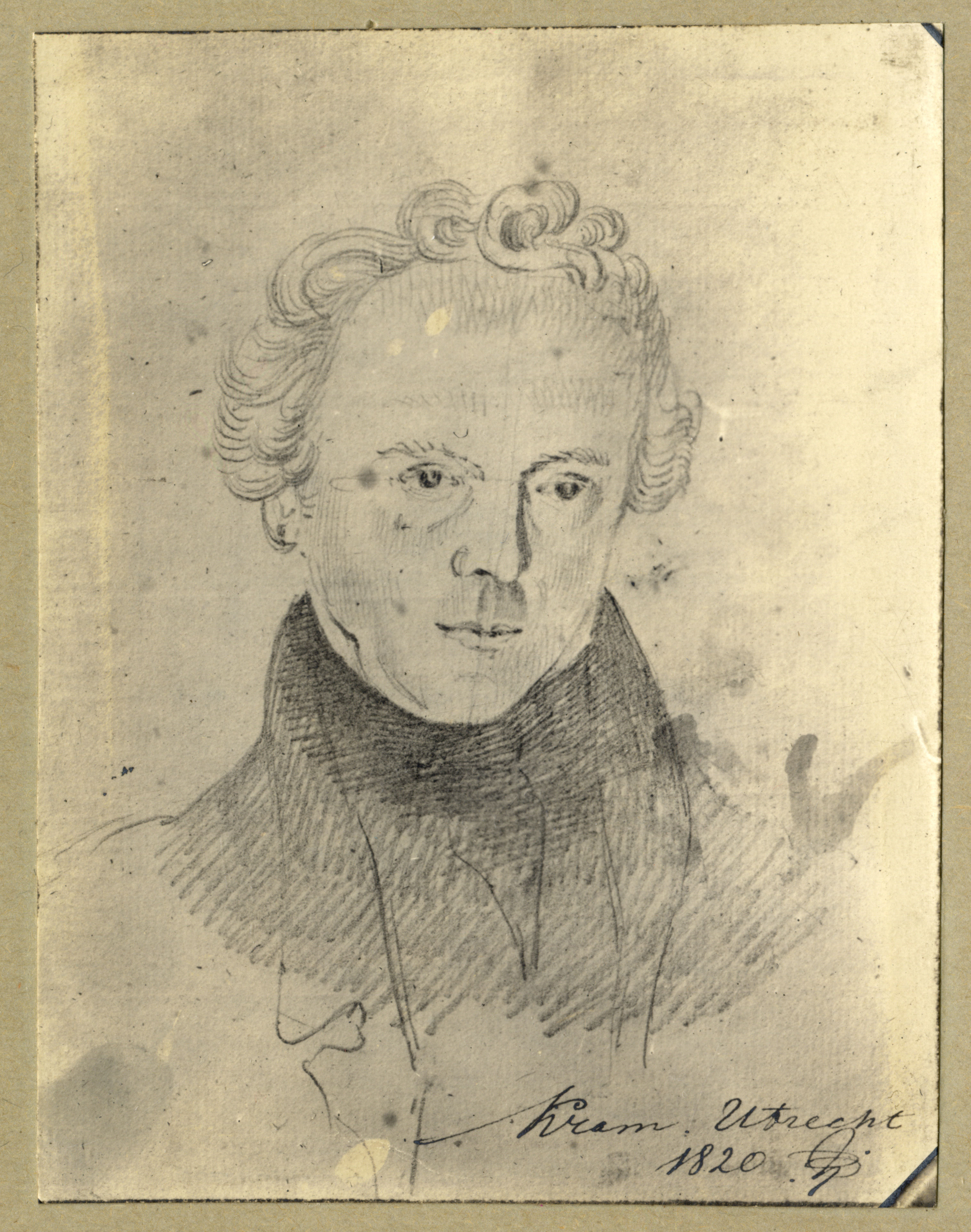 Portret van Christiaan Kramm, geboren 1797, architect, kunstschilder en biograaf te Utrecht, overleden 1875. Borstbeeld van voren. Fotoreproductie van een tekening van Pieter van Loon uit 1820. De tekening bevond zich toen bij mevrouw de douairière Calkoen, geboren Rethaan Macaré.